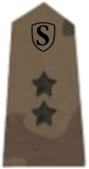 Podporucznik ZS